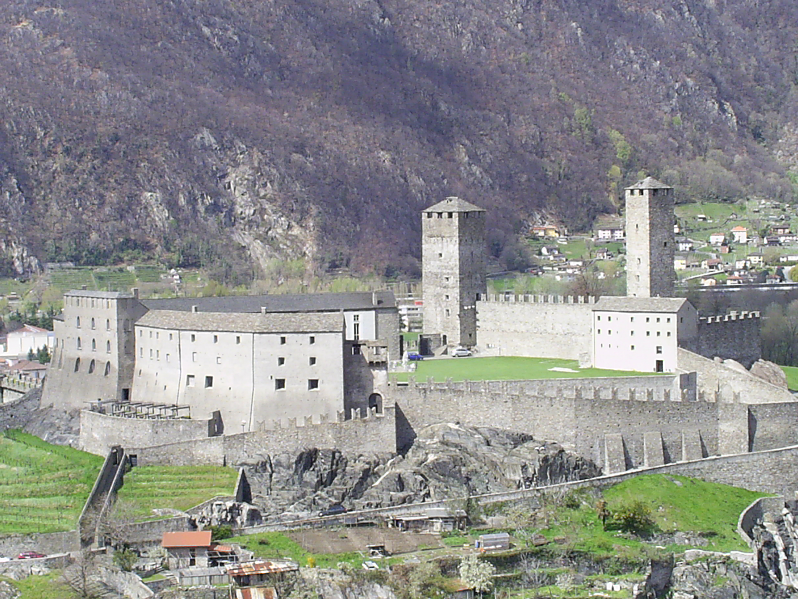 Château de Castelgrande